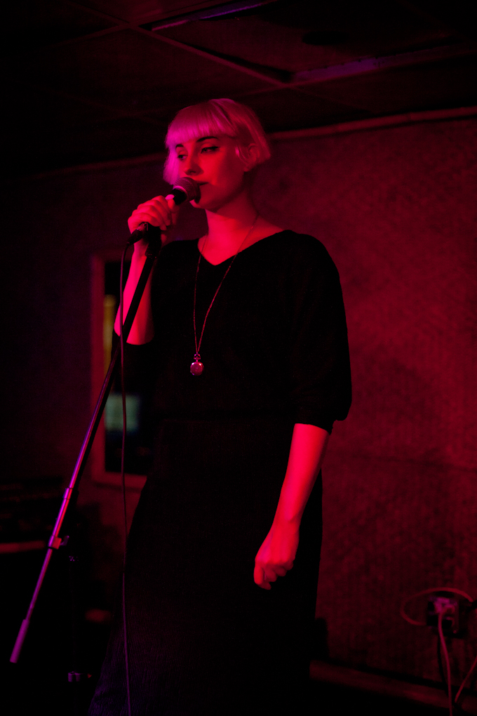 Molly Nilsson at the Waldorf Oct. 11th, 2012